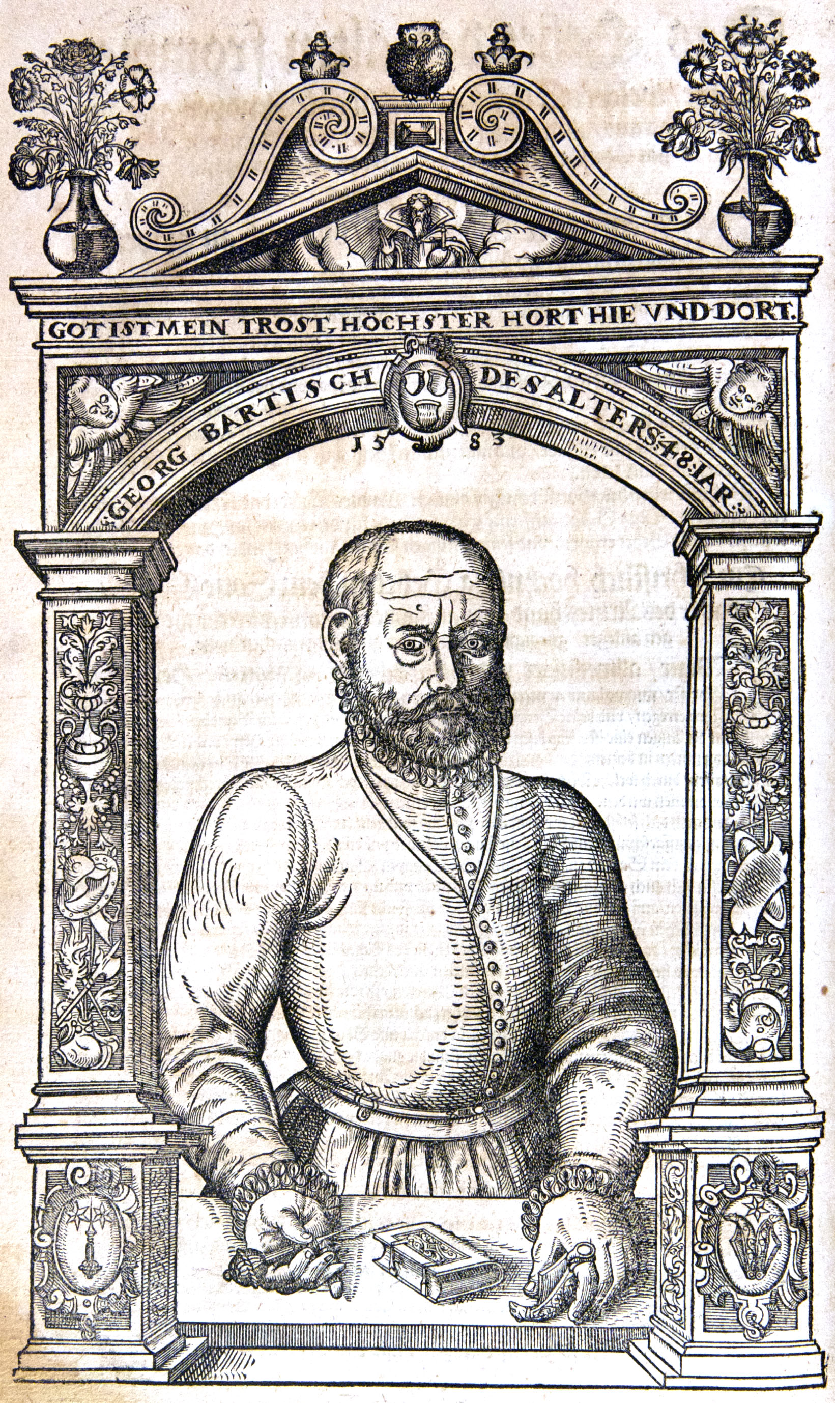 Ophthalmodouleia, p. 4v